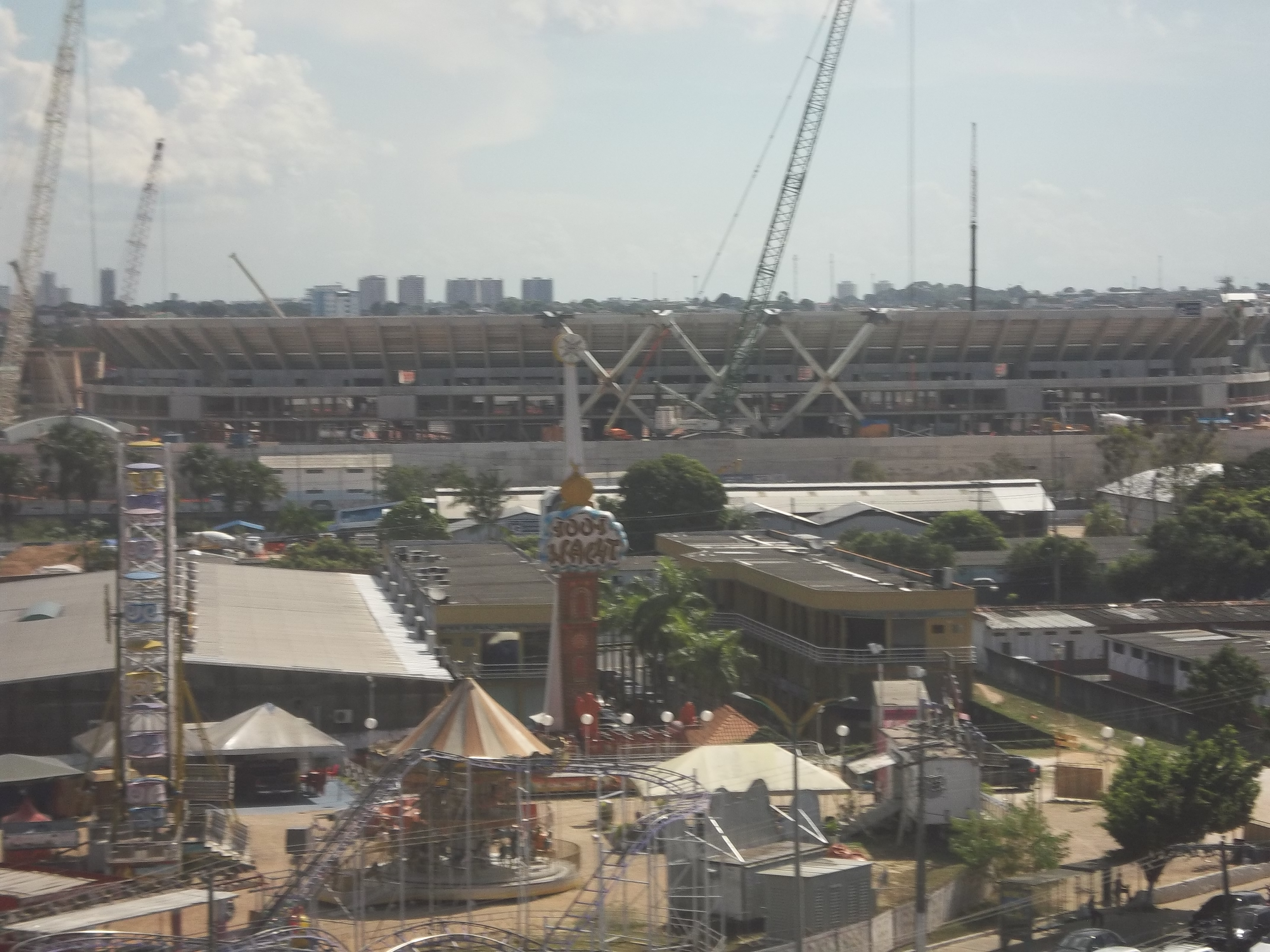 Vista da Arena Amazônia, em Manaus, durante sua construção, em 2013.